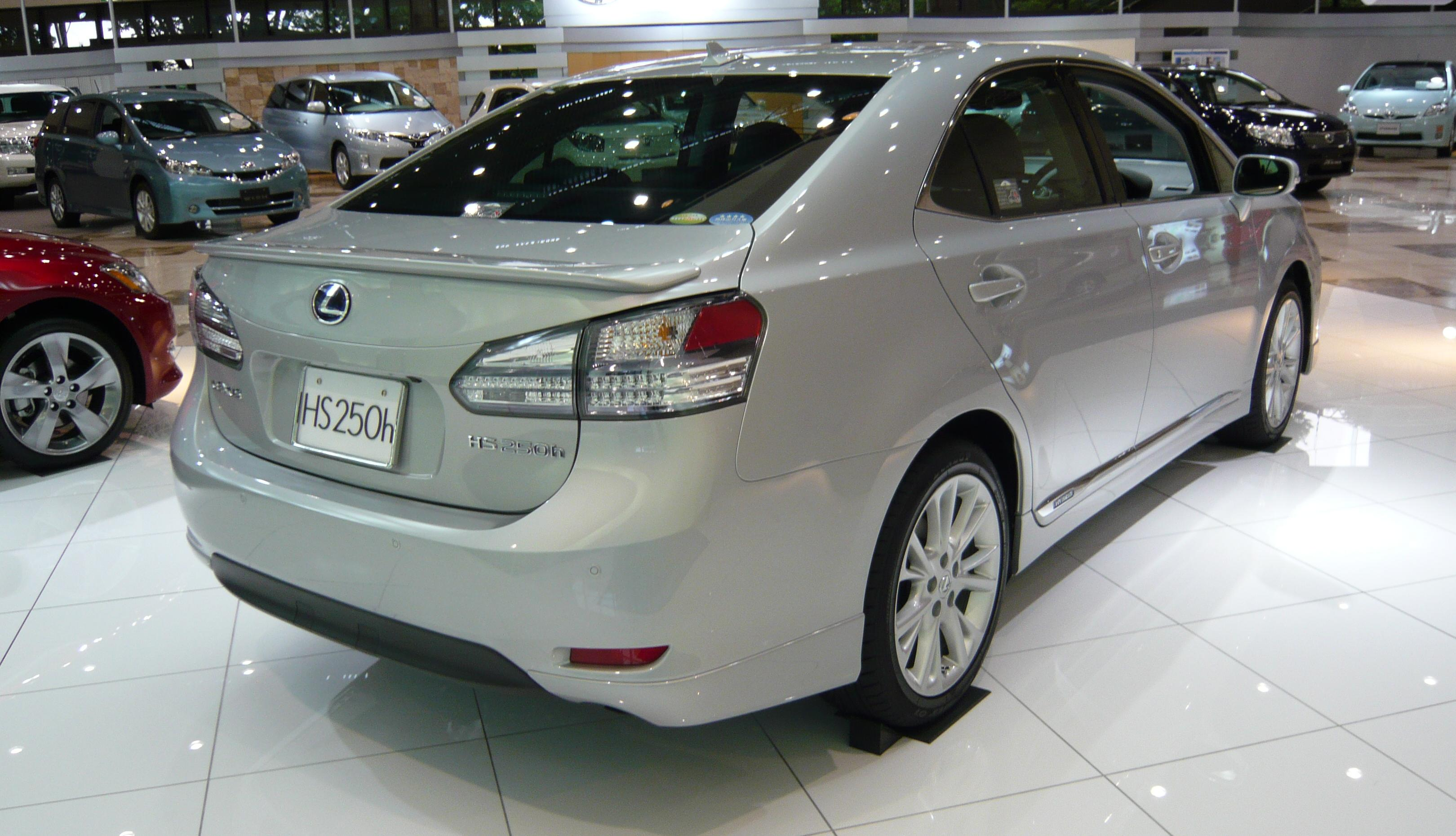 Lexus HS250h